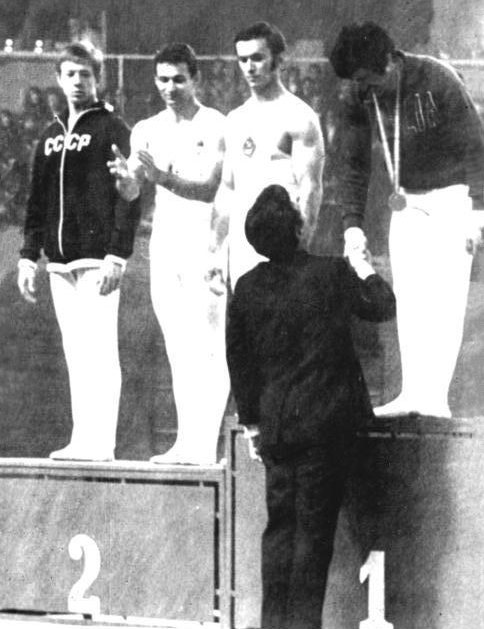 Zentralbild-AP-Tele-16.5.71-wen-Madrid: 9. Turn-Europameisterschaften der Herren am 14. und 15.5.71-Siegerehrung im Barrenturnen am 15.5.71 v.r.n.l.: Der Italiener Giovanno Carlixnucot (1. Pl. ) und auf den 2. Platz von Woronin (UdSSR), Klaus Köste (DDR) und Adrianow (UdSSR)